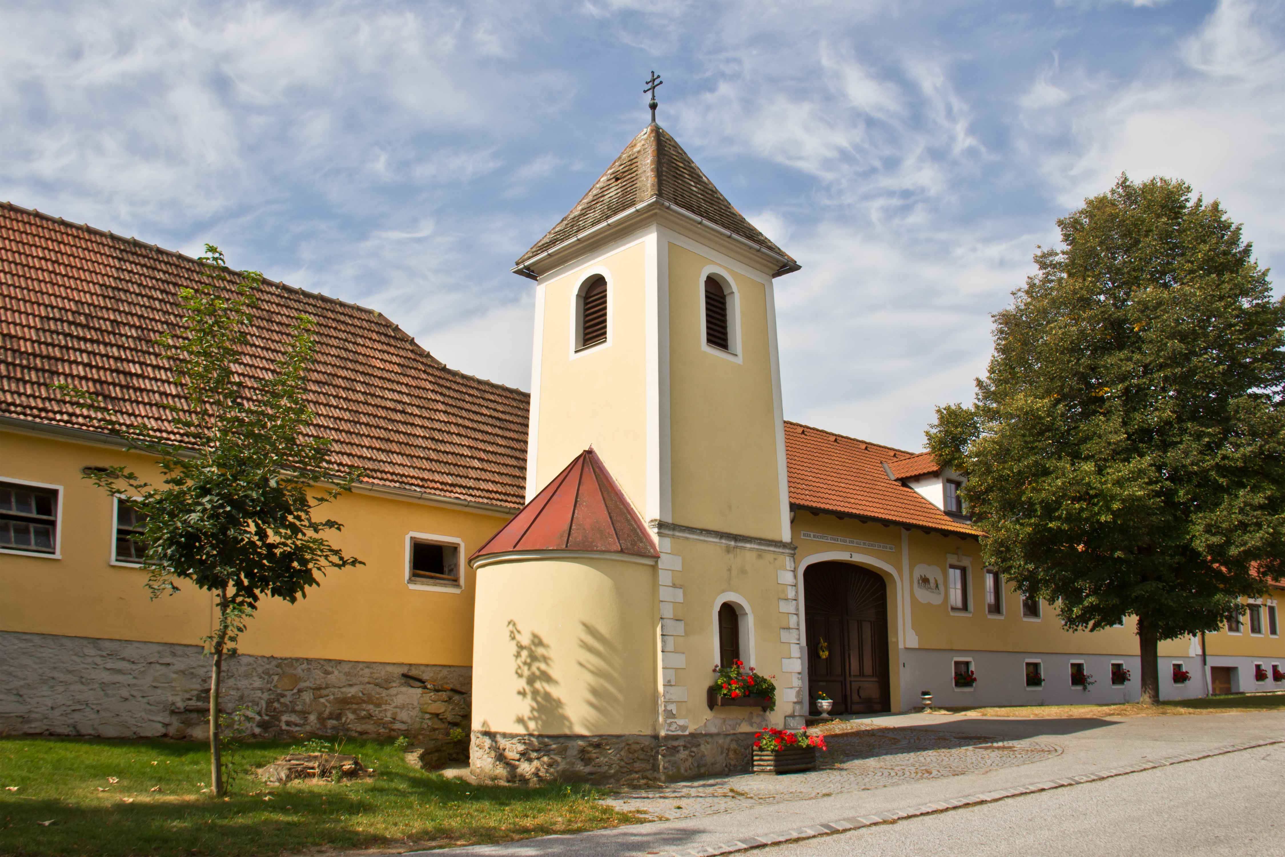 Die Ortskapelle von Burgerwiesen ist ein im späten 19. Jahrhundert errichteter Turmbau mit einer halbrunden Apsis an der Südseite, einem Pyramidendach und Eckquaderung.